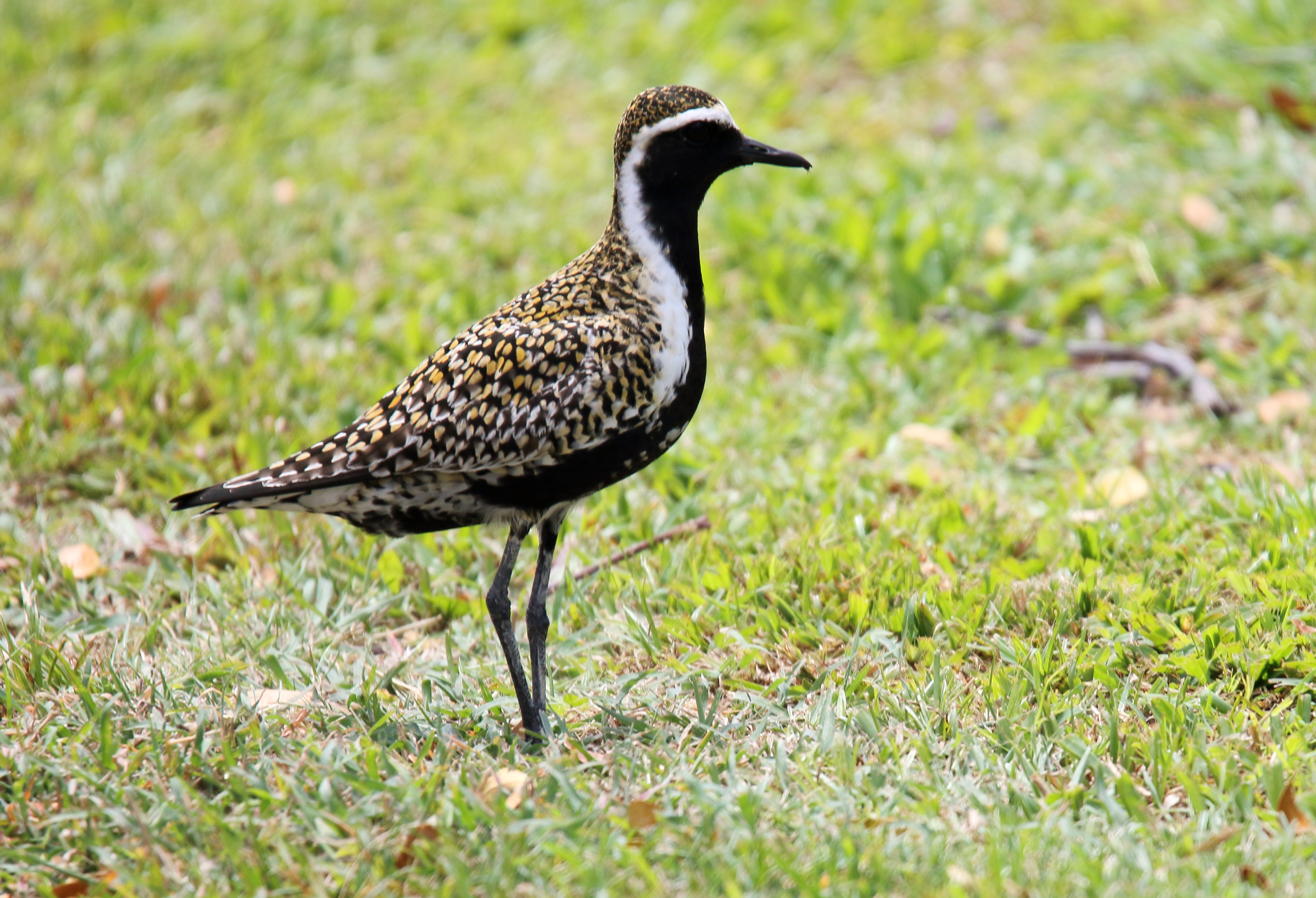 Pacific Golden Plover (Pluvialis fulva)